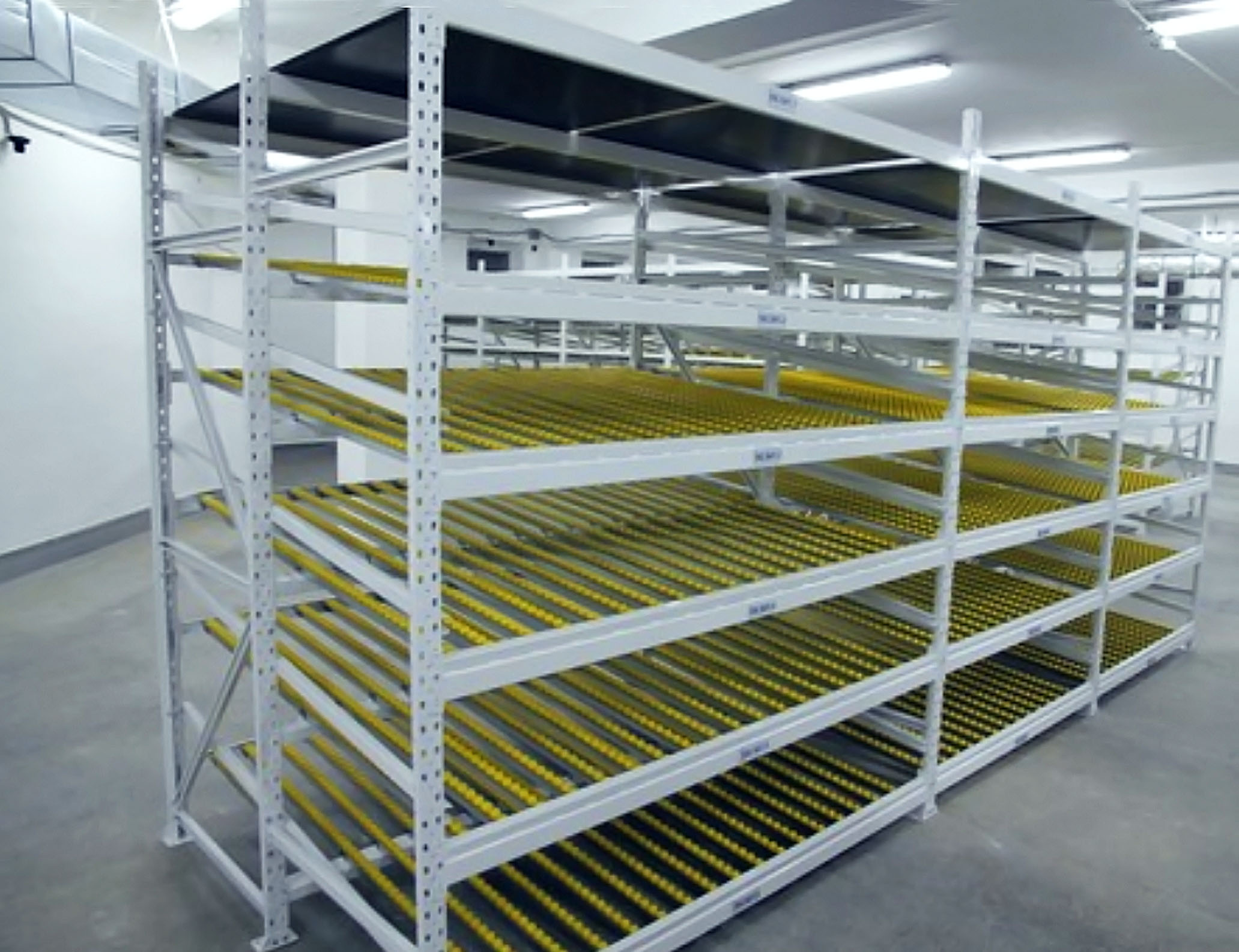 Фото полочной гравитационной конструкции